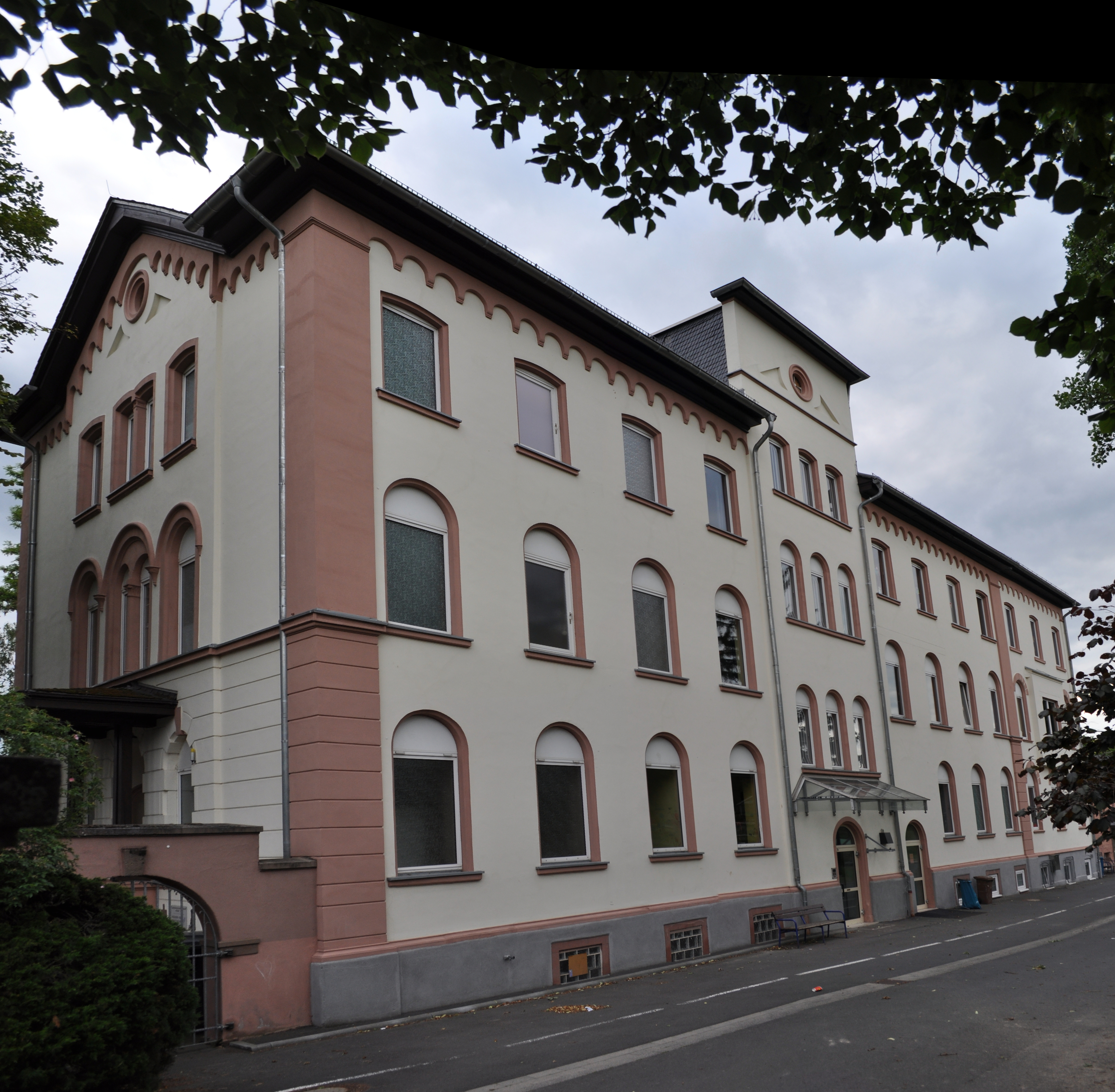 Bad Camberg, Gisbert-Lieber-Straße 1, ehemaliges Bürgerhospital